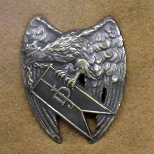 Odznaka 2 puł